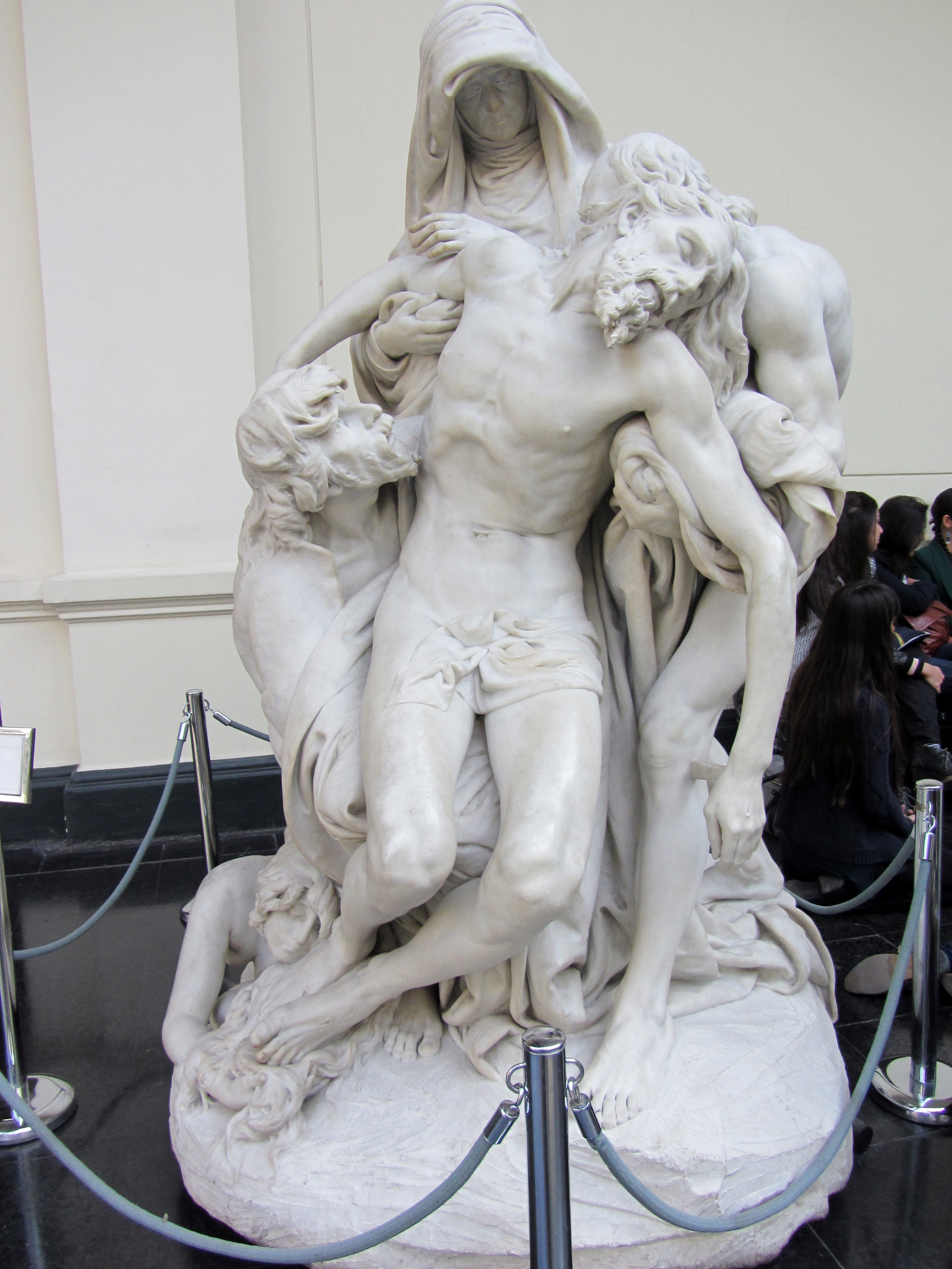 Escultura